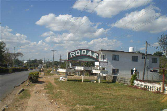 Entrada al pueblo desde la carretera Rodas -Cienfuegos